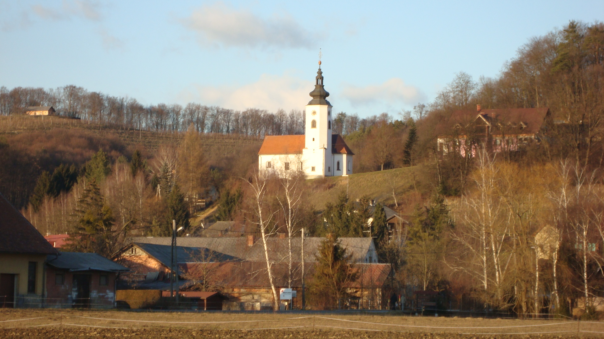 cerkev v Podgorcih slikana od daleč